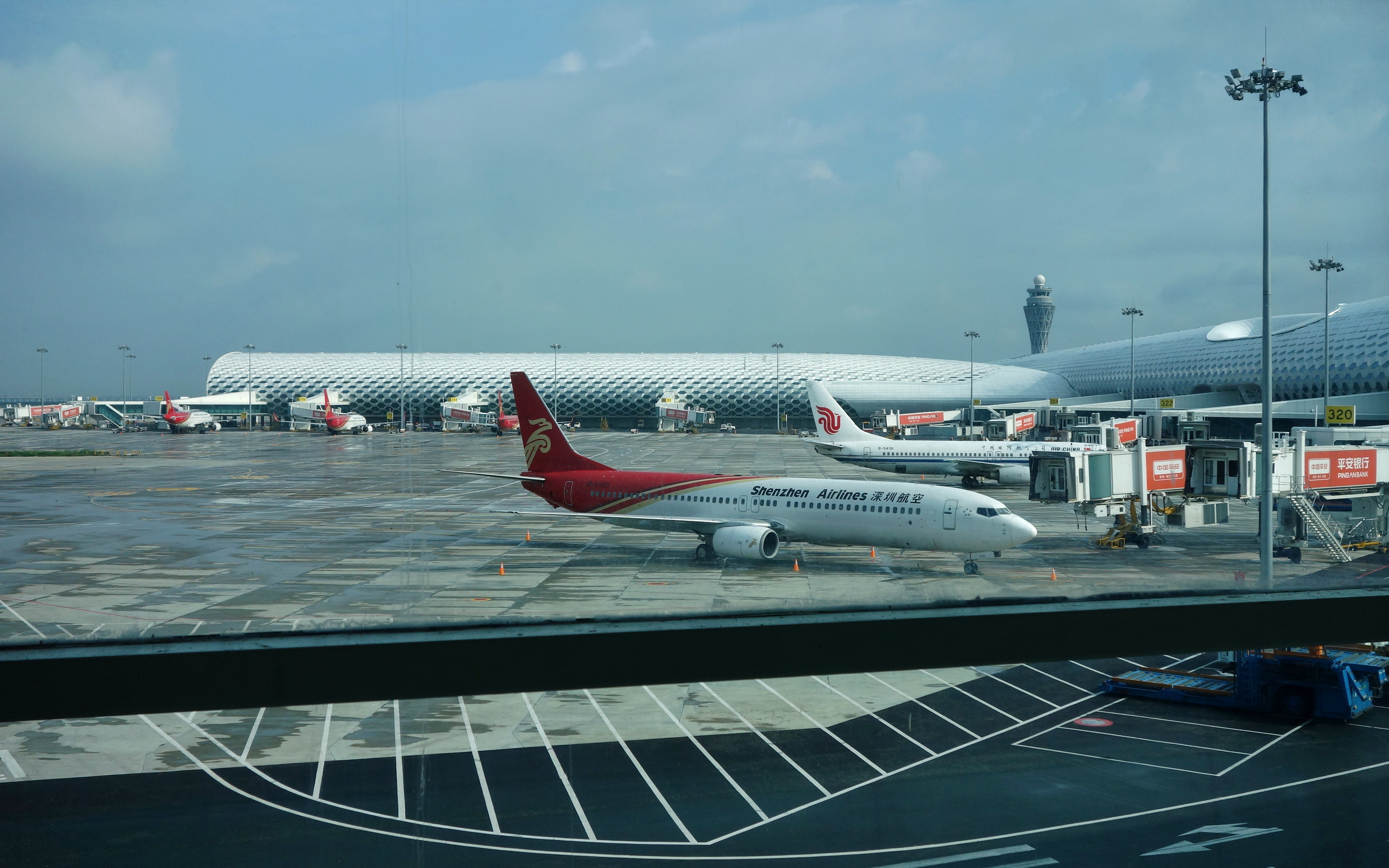 深圳宝安国际机场航站楼